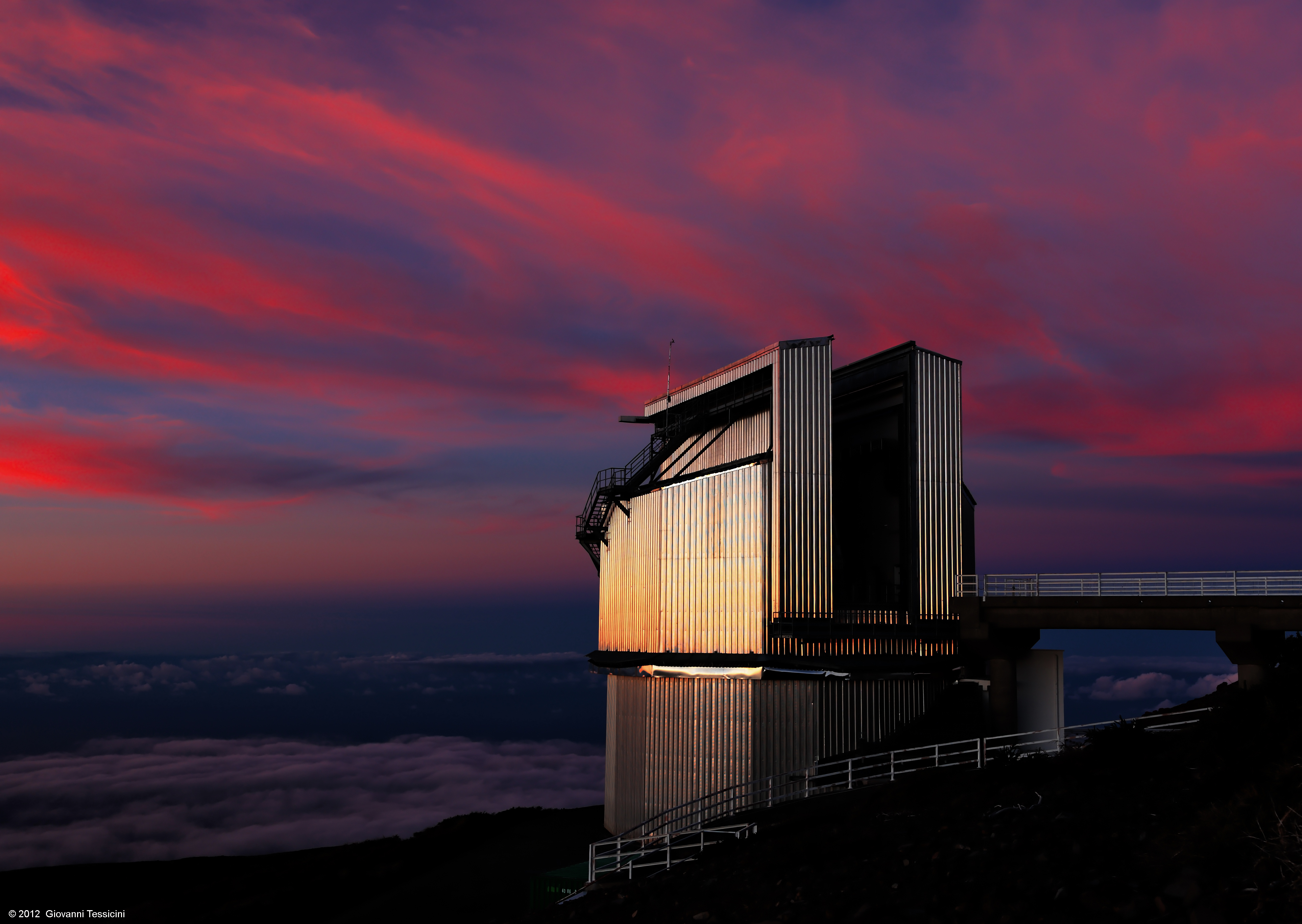 The TNG on the evening of December 31, 2012. A particularly colorful sky closed the year while people in the control room were preparing for a night of observation with HARPS-N, the high resolution spectrograph used for the discovery and characterization of extrasolar planets. The TNG (Telescopio Nazionale Galileo) is a 3.58-meter Italian telescope, located at the "Roque de los Muchachos" Observatory on the island of La Palma in the Canary Islands, Spain. The TNG is operated by the "Fundación Galileo Galilei" on behalf of the Italian National Institute of Astrophysics (INAF). Image taken on December 31, 2012 at the Roque de Los Muchachos Observatory.